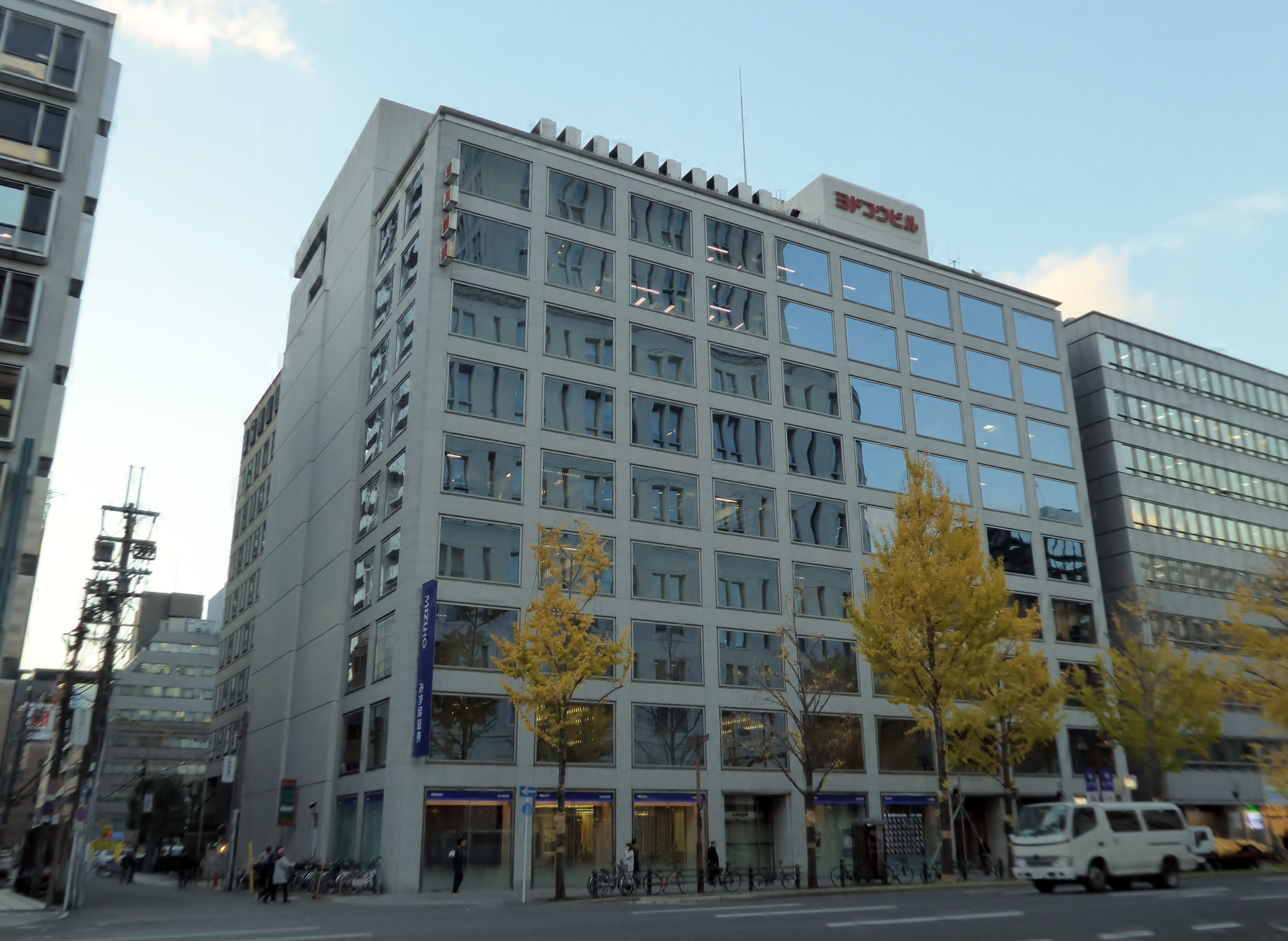 株式会社淀川製鋼所本社を撮影。 Panasonic Lumix DMC-TZ60